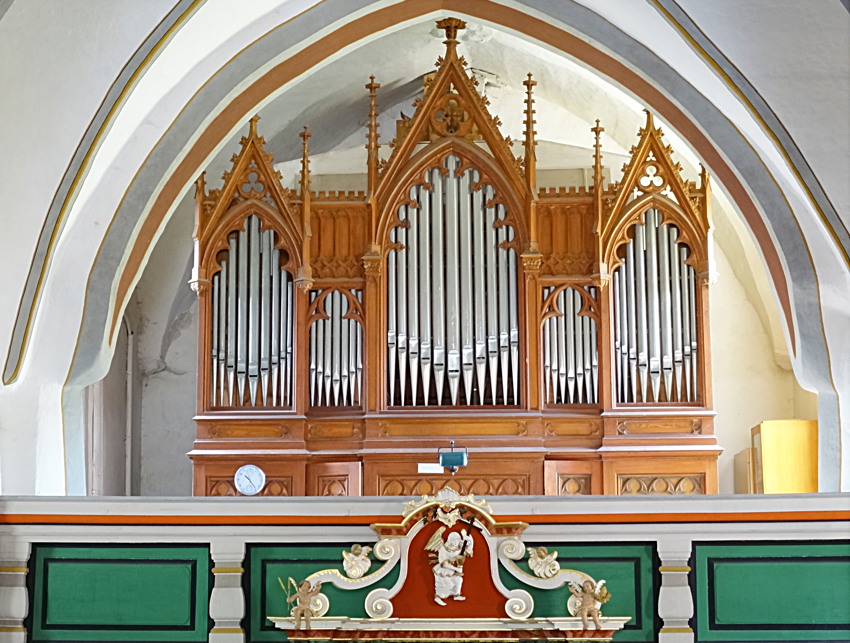 Orgel von Alfred Kühn (1899) in der Stadtkirche St. Bartholomäus und St. Nikolaus, Ziegenrück (II/P 22)[1]